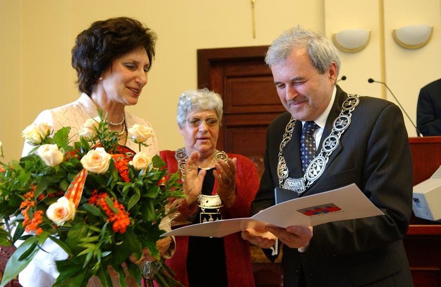 od lewej: Irena Szewińska, Felicja Gwincińska (przewodnicząca Rady Miasta Bydgoszcz) oraz Konstanty Dombrowicz (prezydent Bydgoszczy). Wręczenie Irenie Szewińskiej tytułu Honorowego Obywatela Bydgoszczy